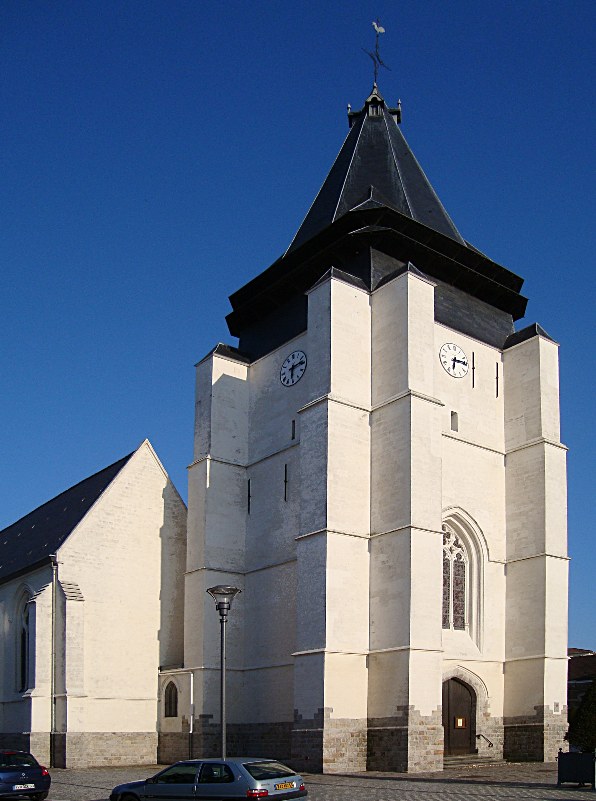 L'église Saint-Vincent de Marcq-en-Barœul. Dédiée à Saint-Vincent de Saragosse, elle a été édifiée en 1516 sur des fondations du XIIe siècle. Elle comporte 3 nefs en pierre bleues de Tournai et pierres blanches de Lezennes.